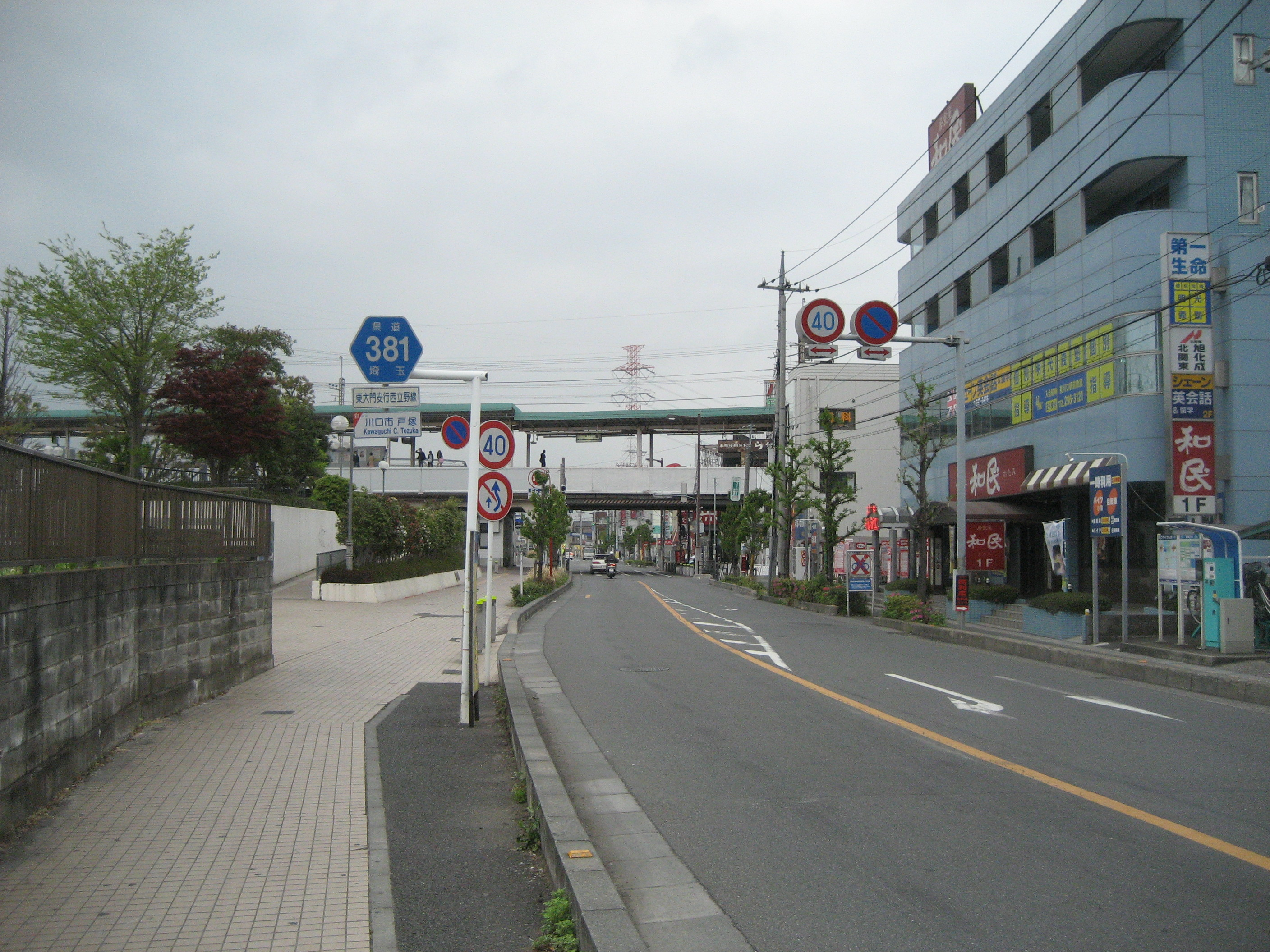 埼玉県道381号線東川口駅付近